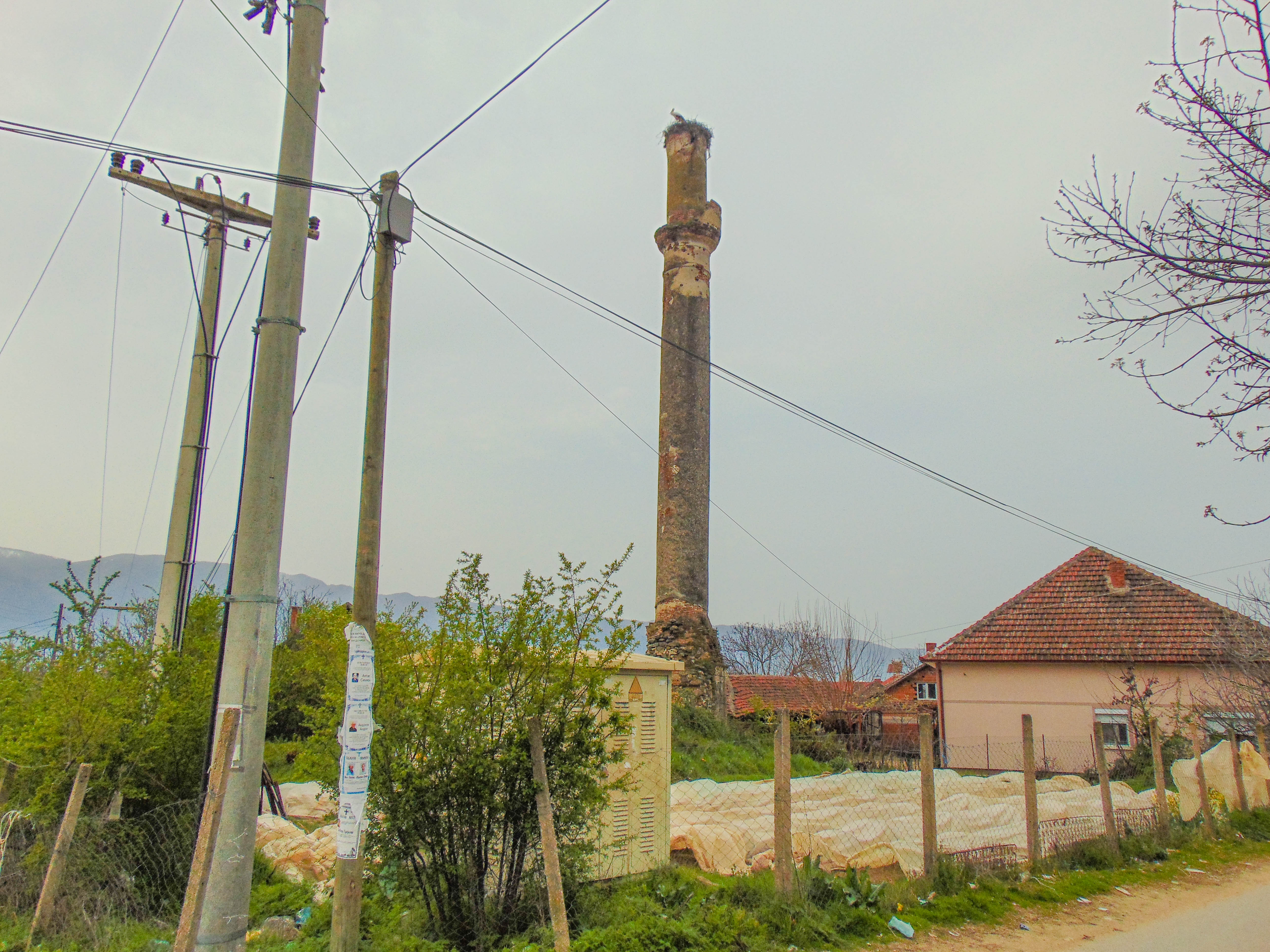 Минаре во Сушица